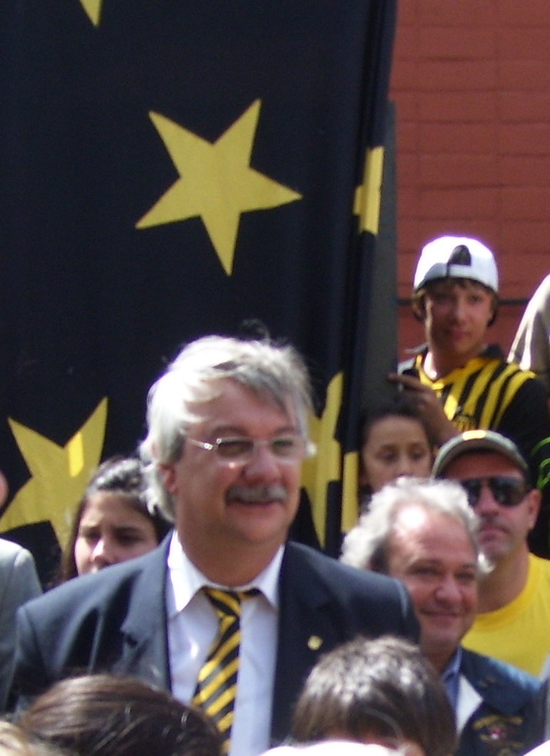 Enrique Pintado, Ministro de Transporte y Obras Públicas (MTOP) de Uruguay, en los festejos por los 120 años del Club Atlético Peñarol; concretamente, parado frente al "Monumento al Arco", un monumento realizado en el sitio que se presume estuvo uno de los arcos de la primera cancha de fútbol en Uruguay.